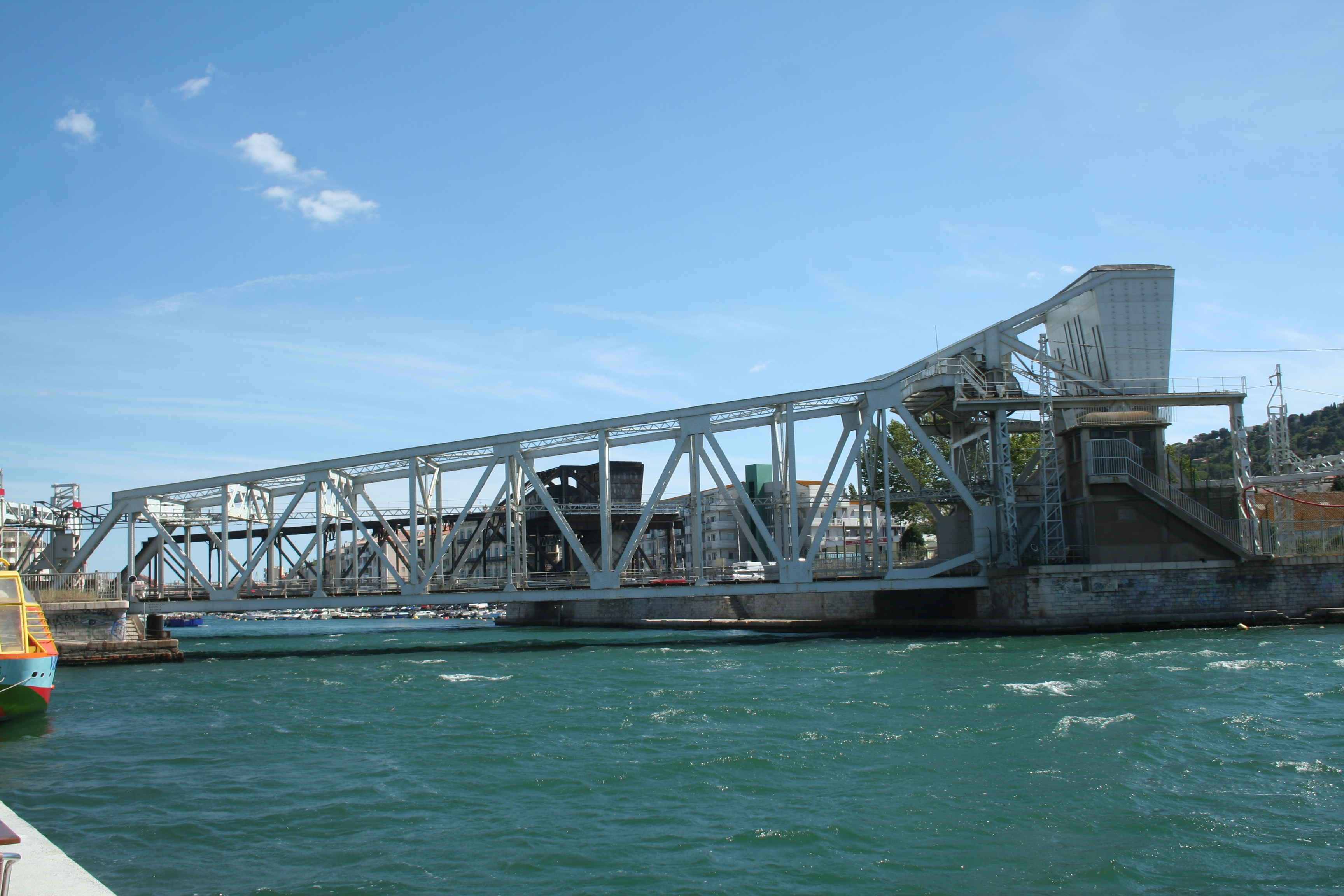 Sète (Hérault) - quartier de la Pointe-Courte - pont Maréchal Foch de chemin de fer.